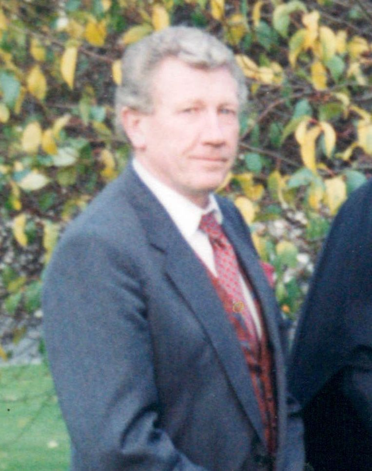 Derrick White